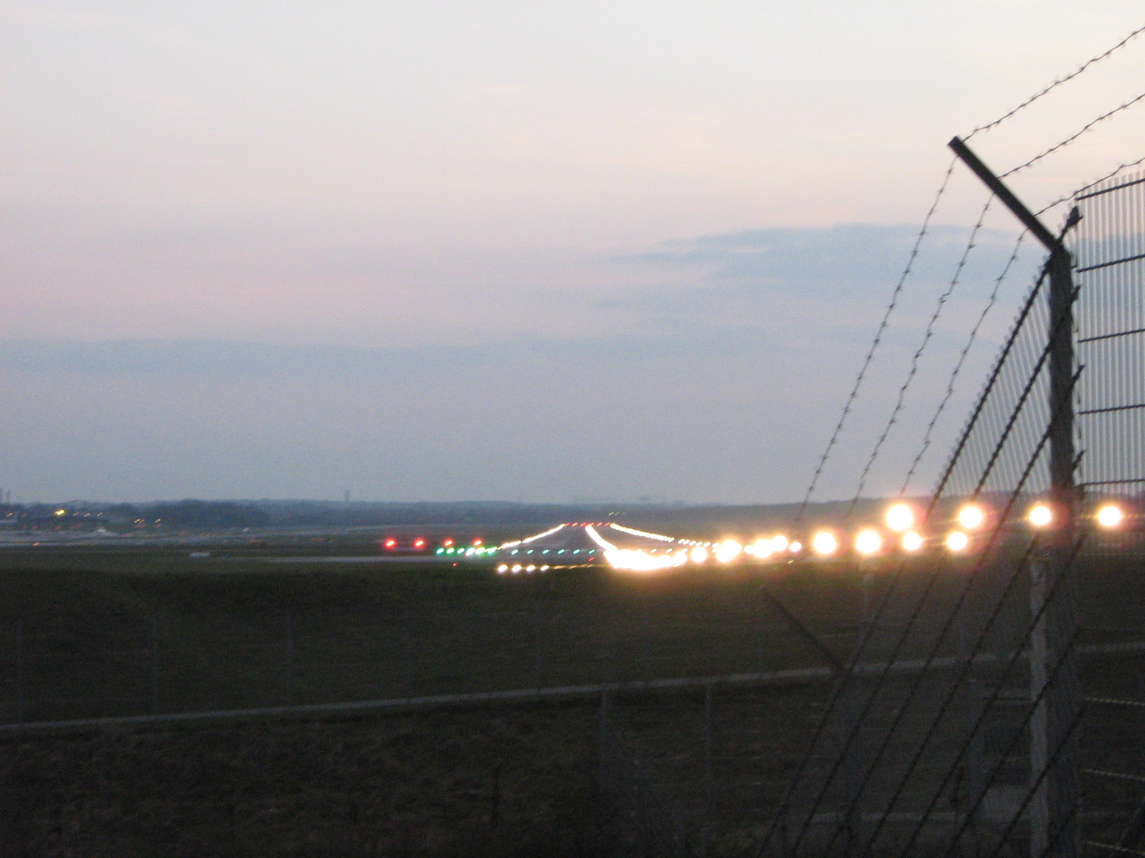 Landebahnbefeuerung Flughafen Hamburg-Fuhlsbüttel, own work Date: March 07 Author: User:Hecki2